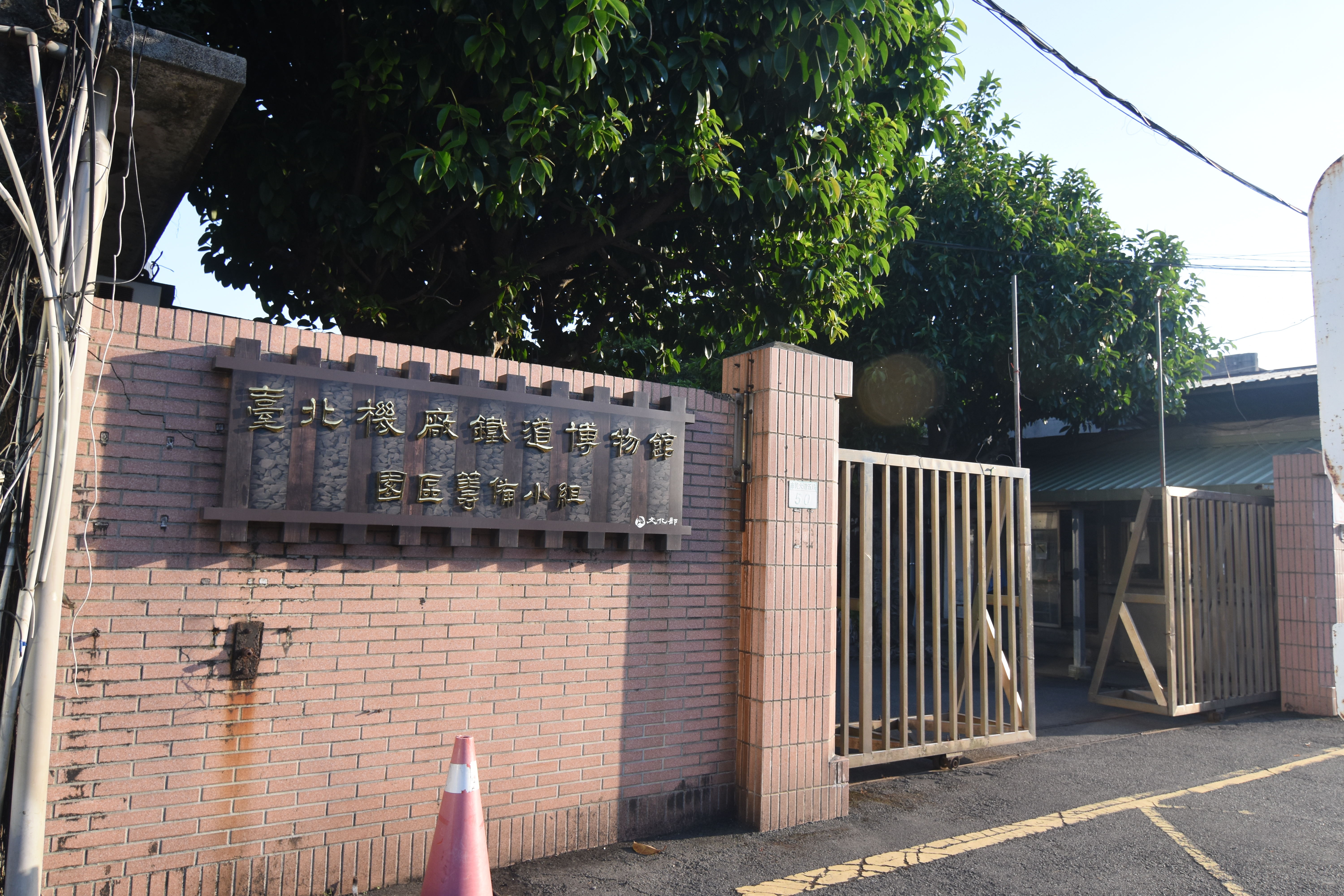 臺北機廠鐵道博物館園區籌備小組，地址：臺北市信義區市民大道五段50號。